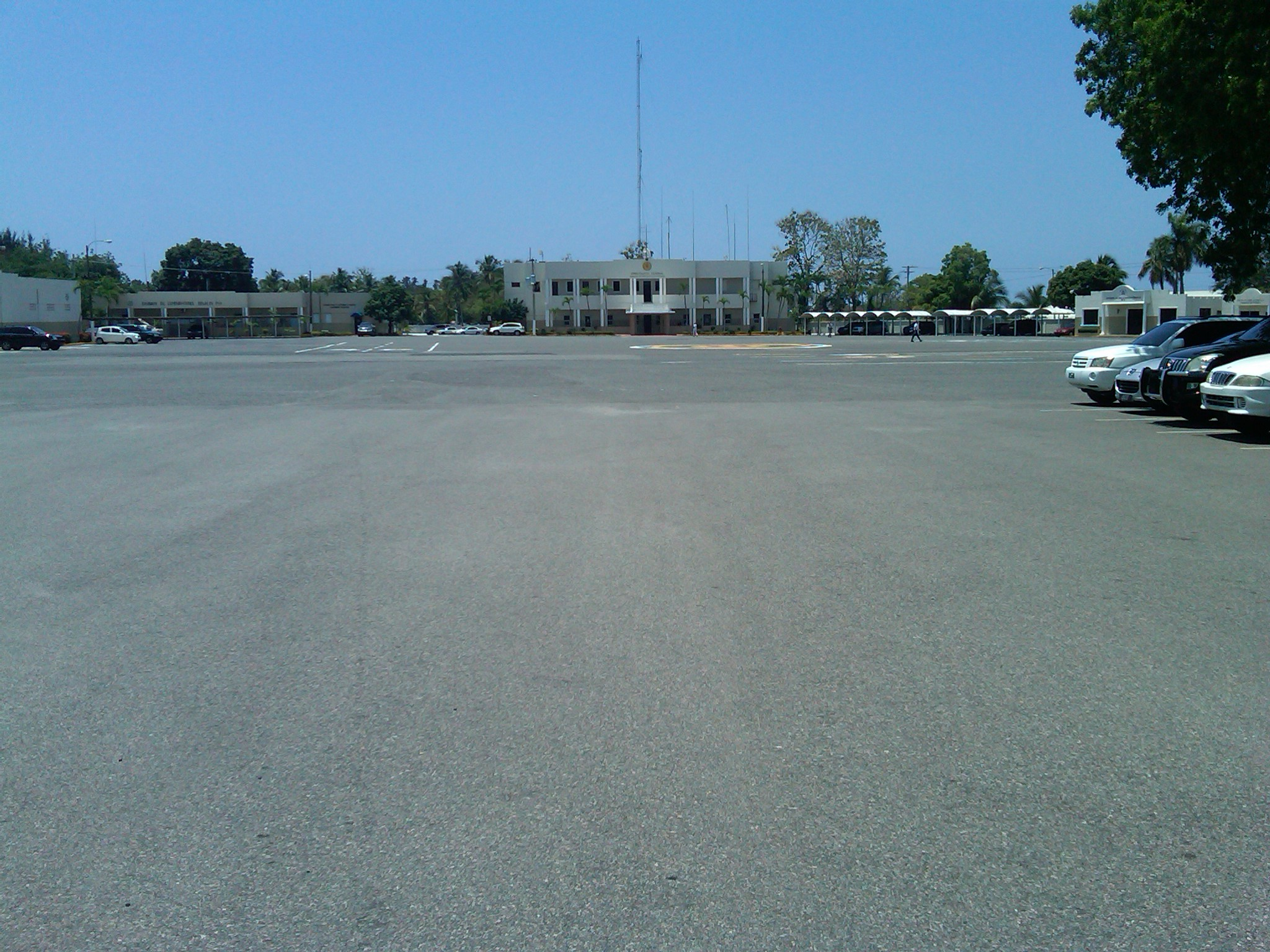 Base de San Souci de la Armada Dominicana, Santo Domingo Este